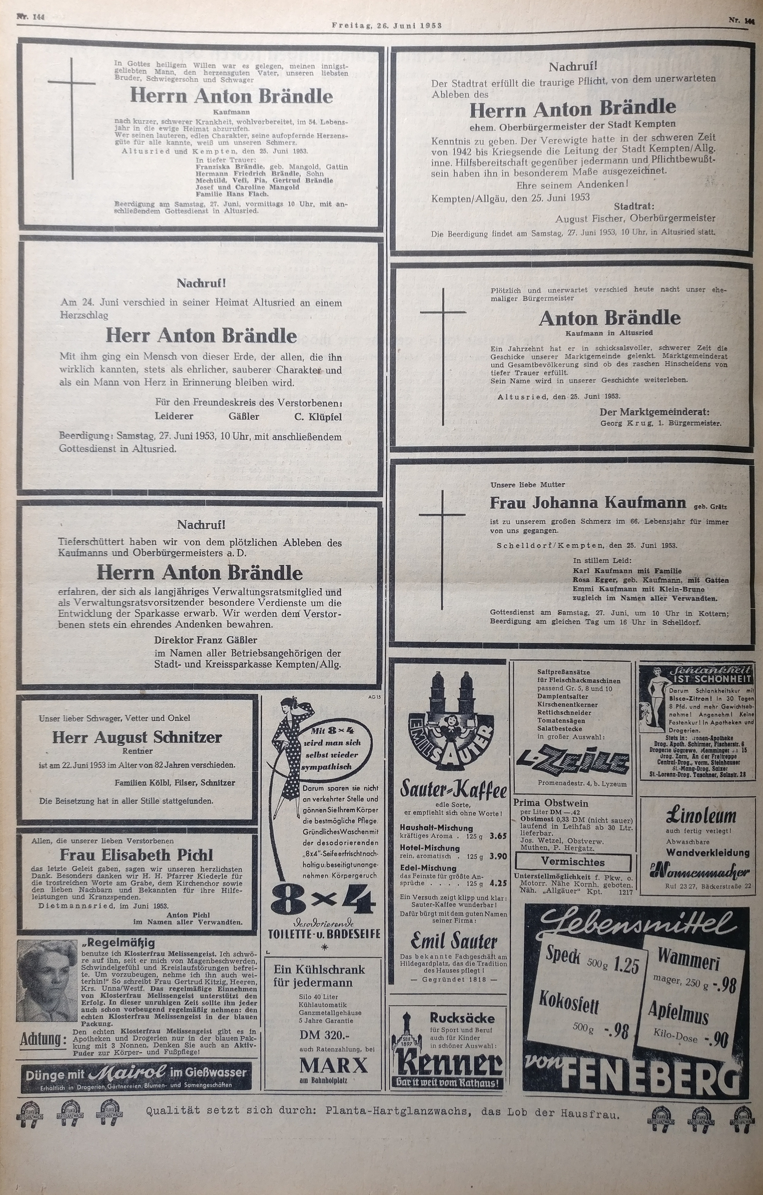 Todesanzeigen zu Anton Brändle